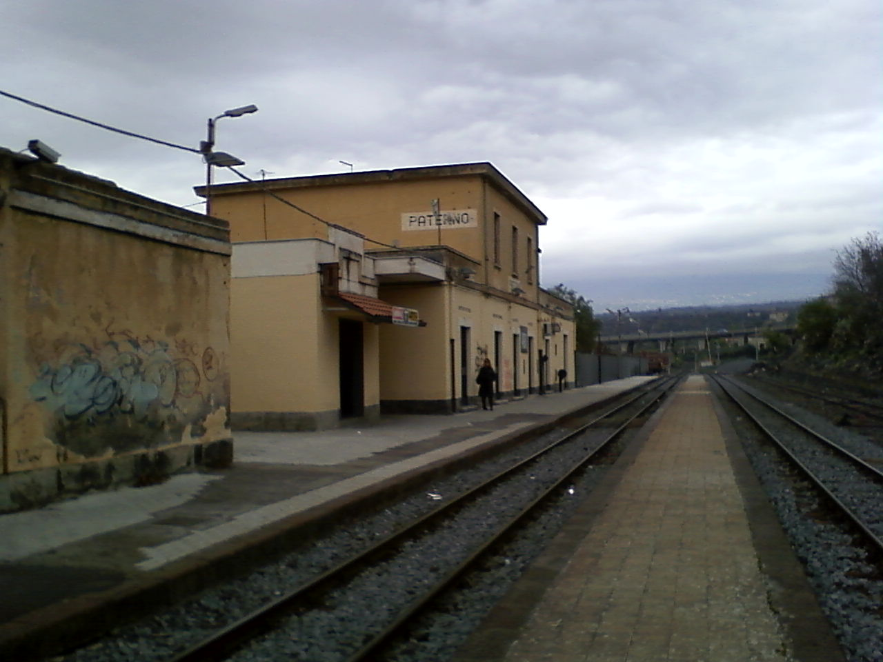 Immagine fotografica della stazione di Paternò della Ferrovia Circumetnea